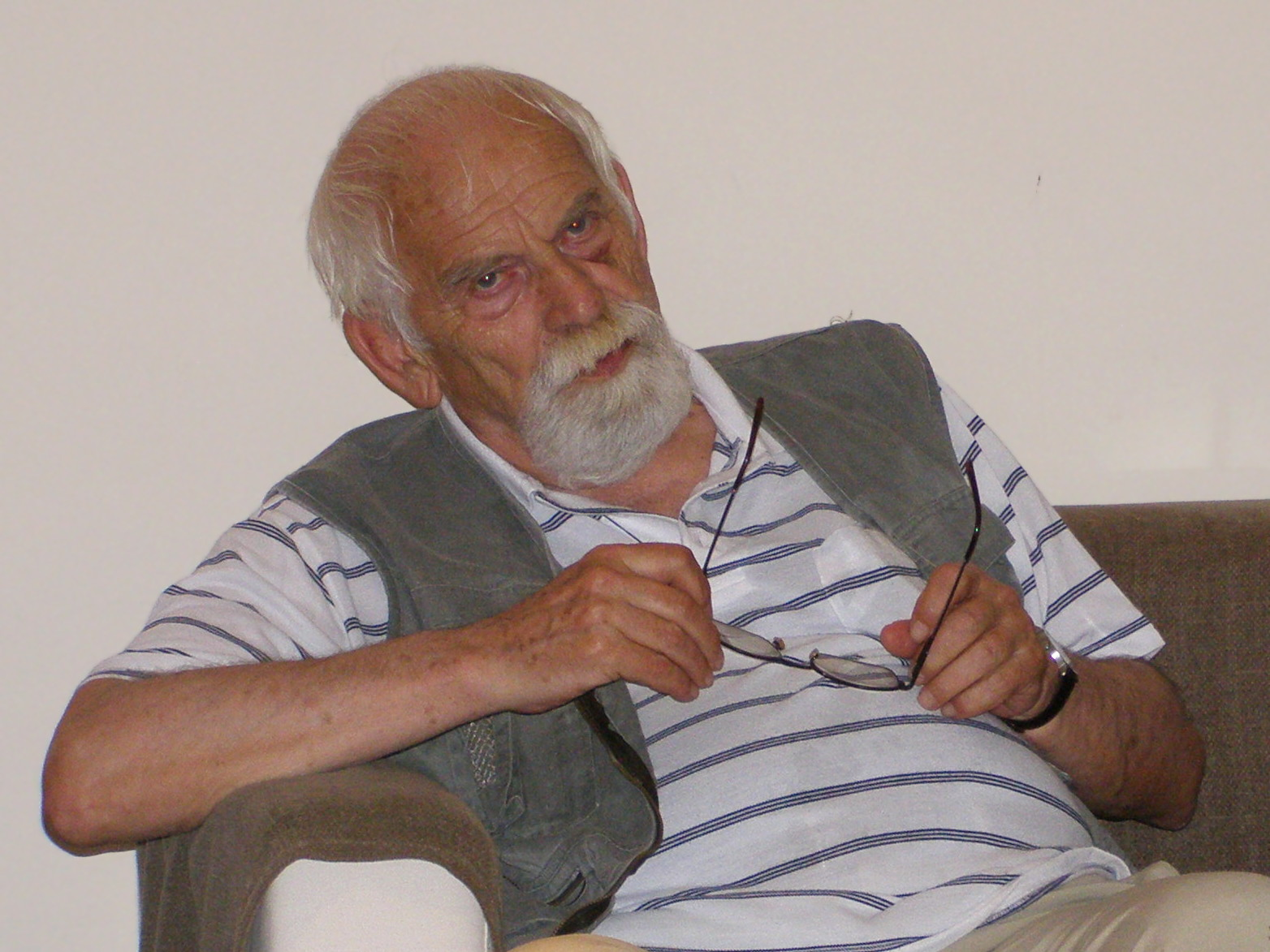 Česky: Jaroslav Med